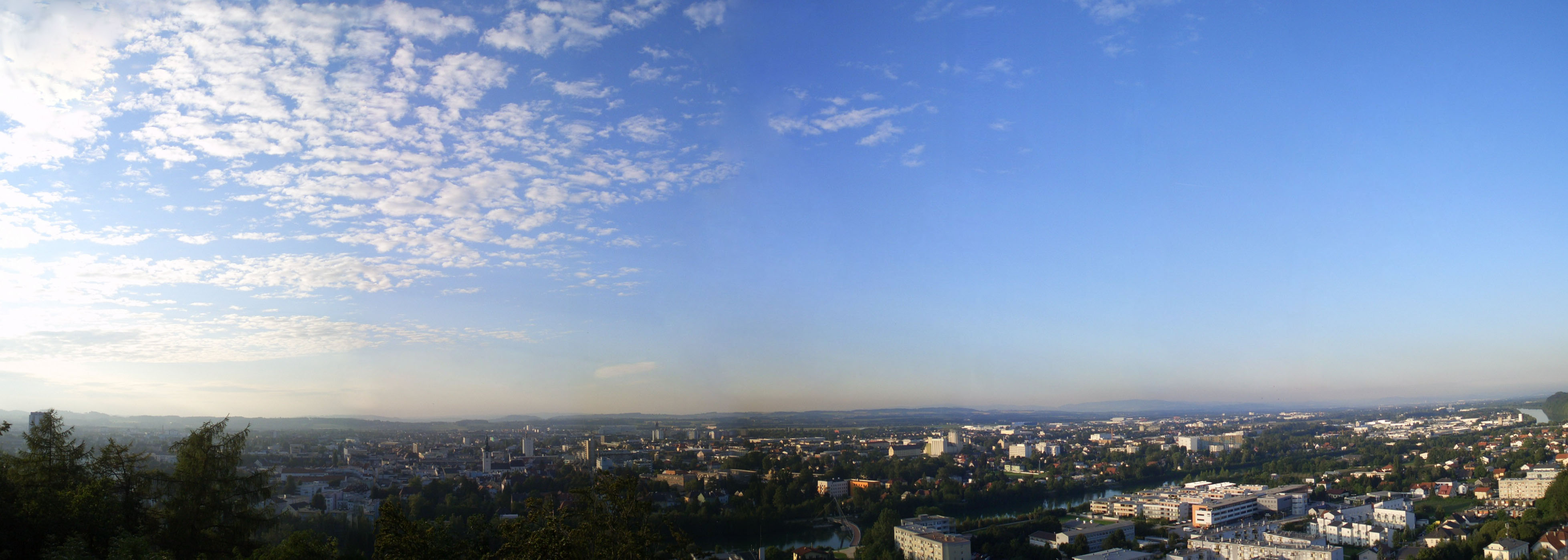 Die Stadt Wels von der Marienwarte aus, mit PhotoStitch aus eigenen Bildern zu einem Panoramafoto zusammengefügt